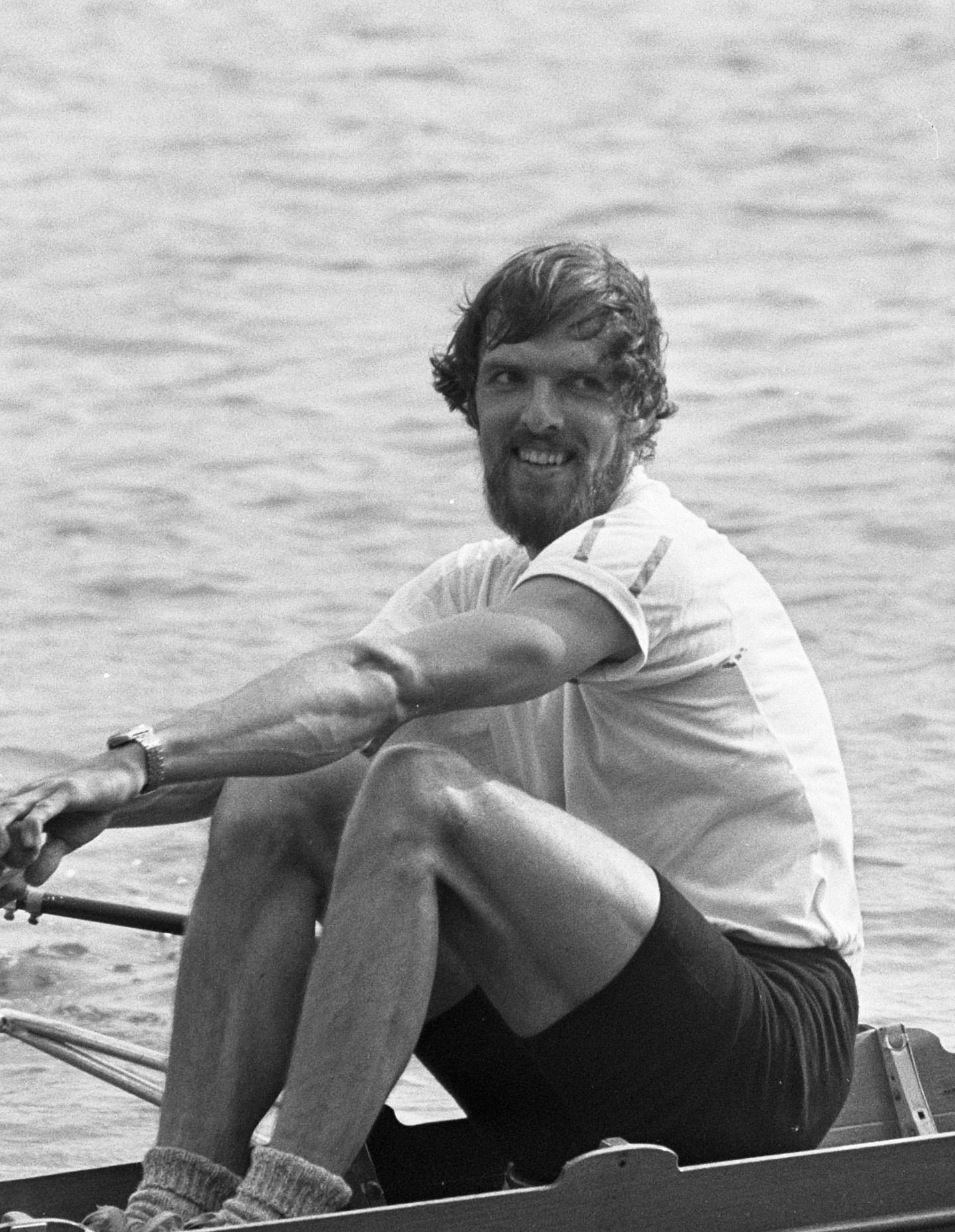 Nationale roeiwedstrijden op Bosbaan te Amsterdam, de E2 tegen Nunens met van der Hirst en Boeschoten